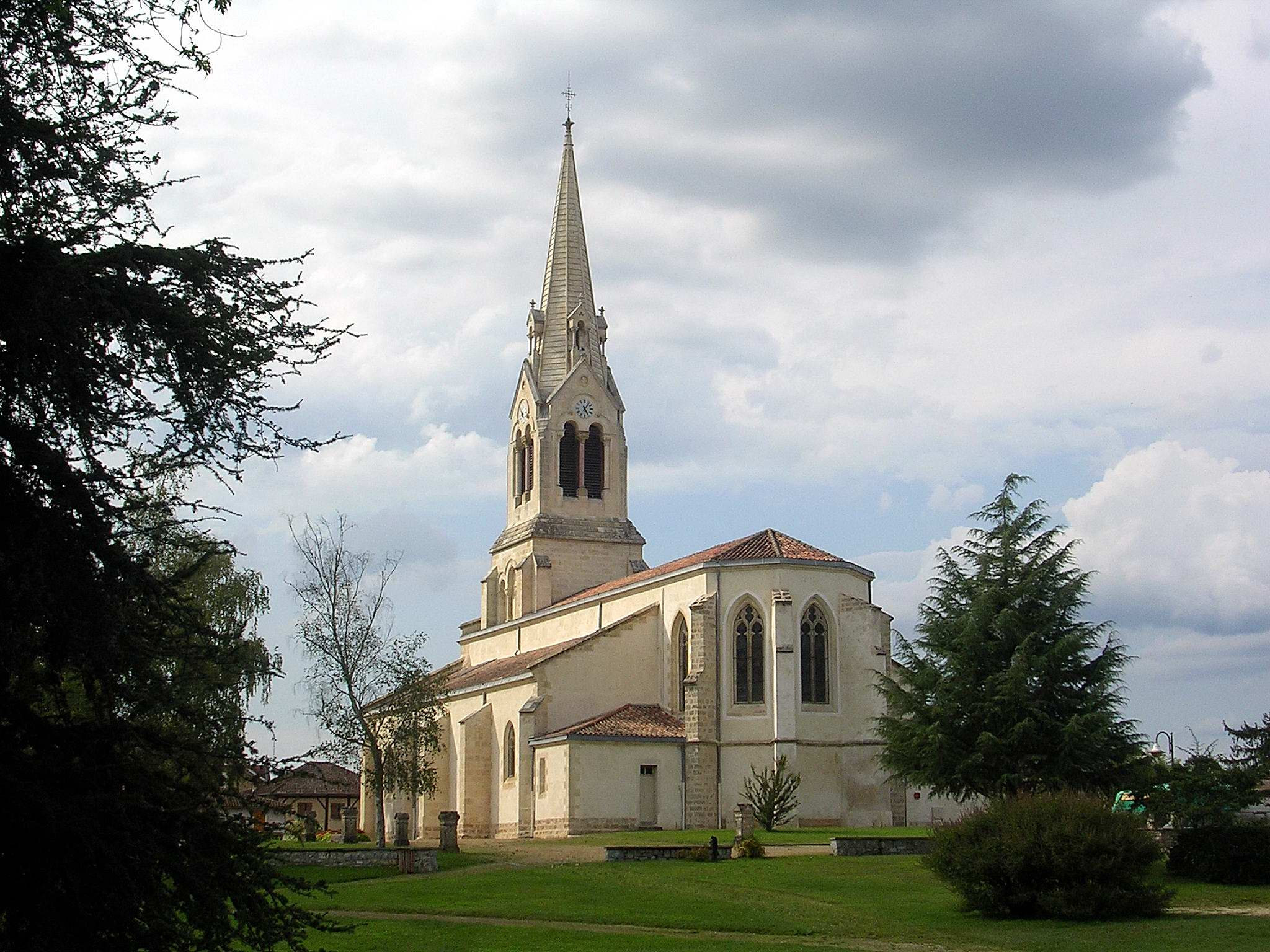 Église Saint-Barthélemy de Rion-des-Landes